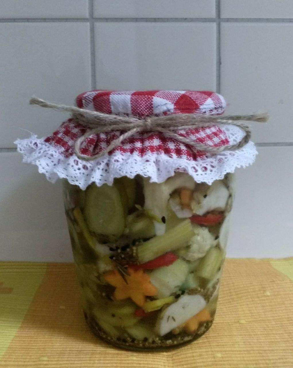 Mix Torshi